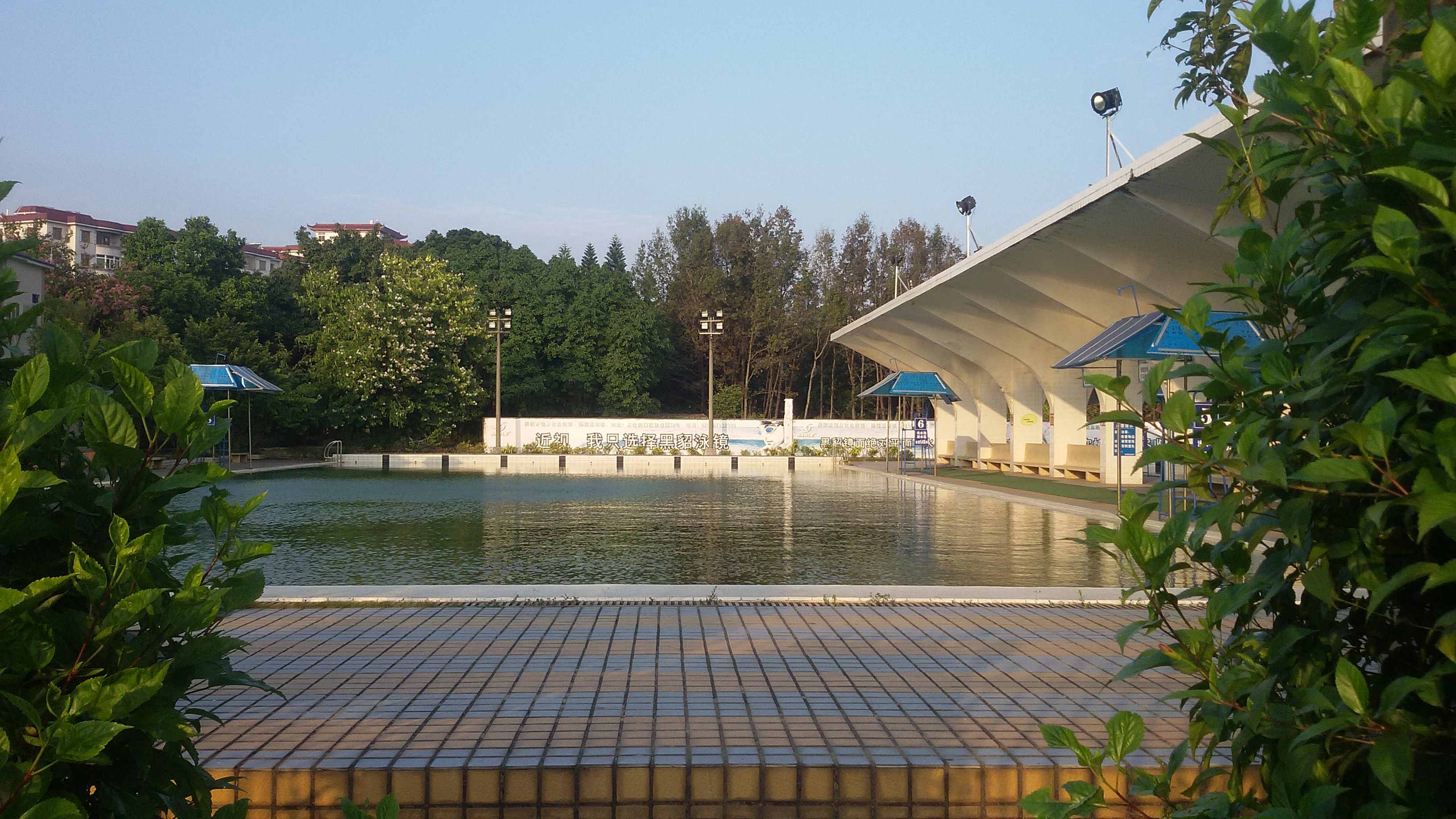 粵語: 河滨泳场嘅浅水池